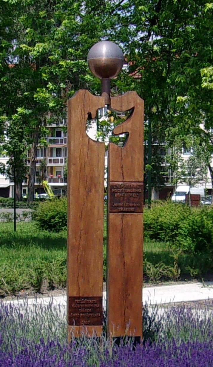 John Lennon-emlékoszlop, Kazincbarcika